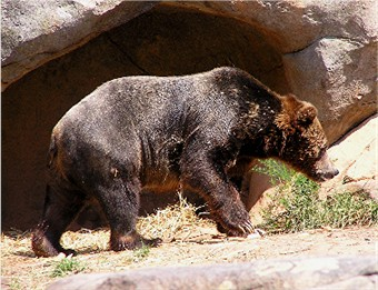 grizzlybeer (Ursus arctos horribilis). Foto J. Folmer North Carolina Zoological Park